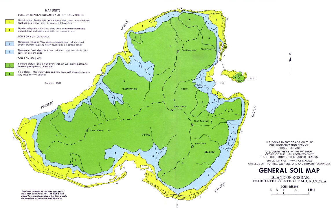 Karte der Insel Kosrae